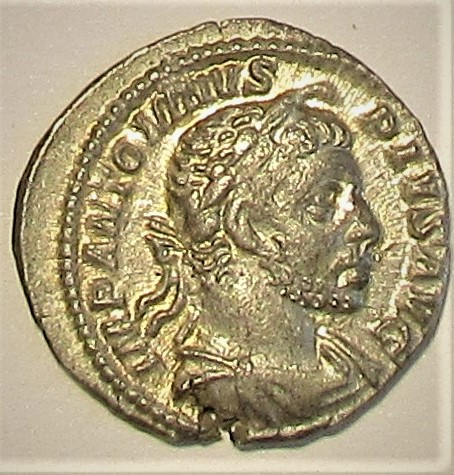 Elagabal auf Denar mit "Horn", Kampmann 56.48